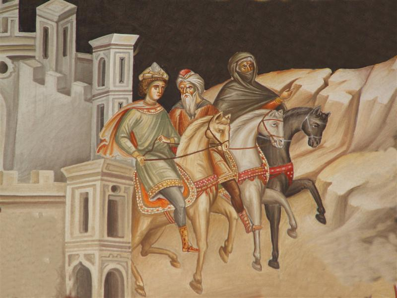 Foto:Jose Goncalves